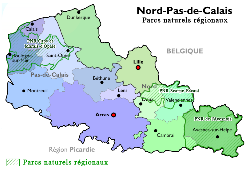 Carte de la région française du Nord-Pas-de-Calais et ses Parcs Naturels Régionaux (du nord au sud : PNR Caps et Marais d'Opale, PNR Scarpe-Escaut, PNR de l'Avesnois)